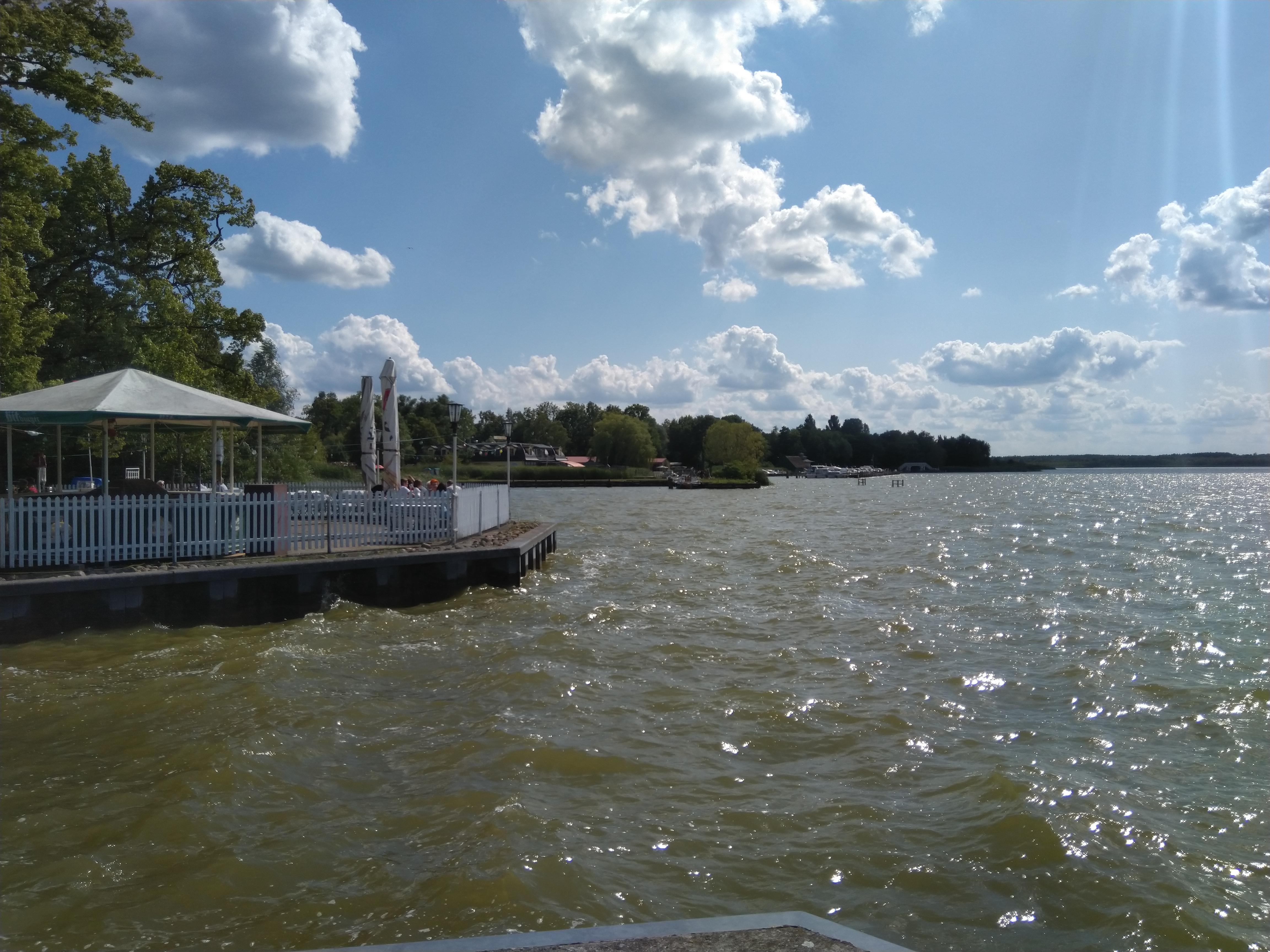 Blick von der Mole des Stadthafens von Neustrelitz auf das Ufer des Zierker Sees